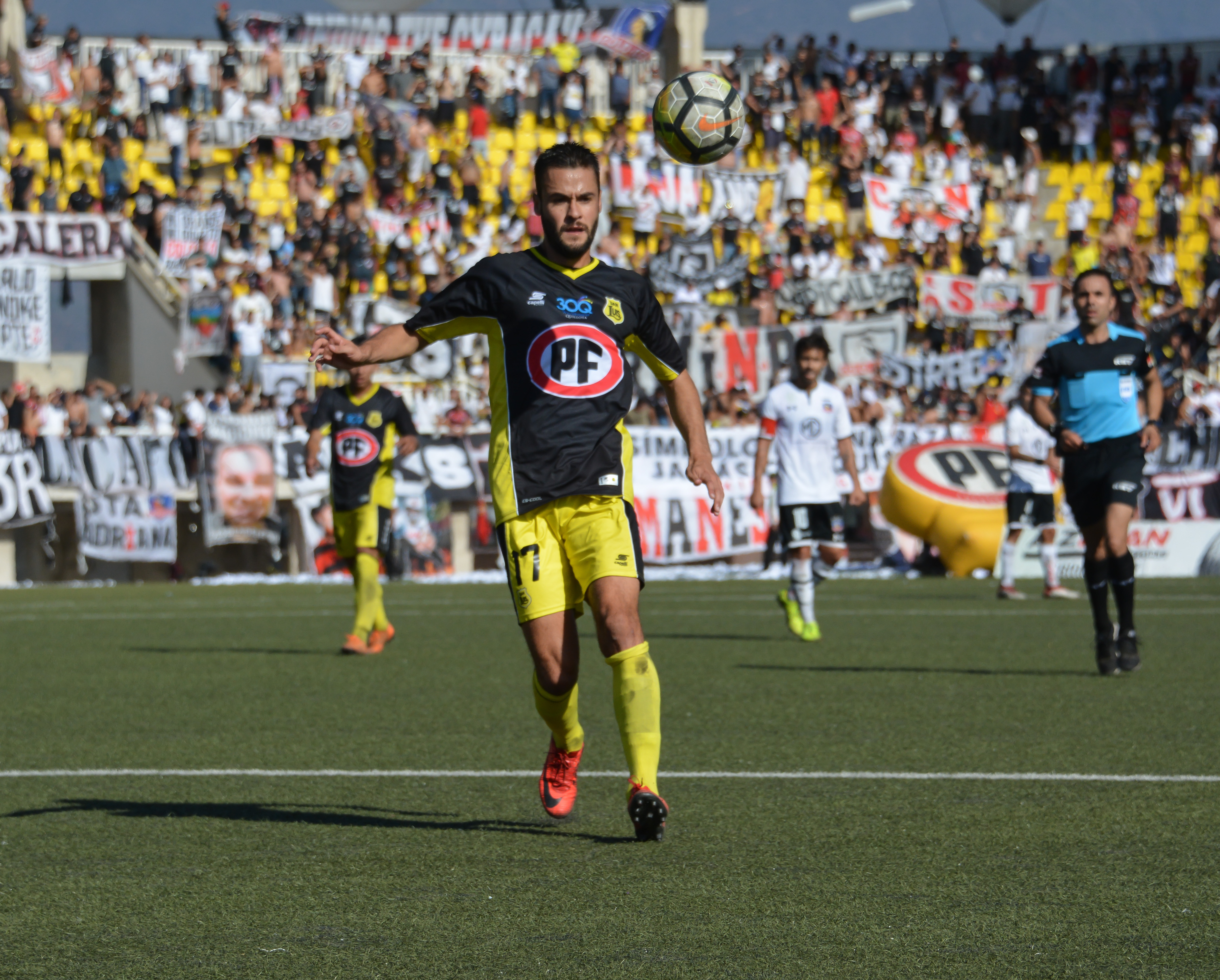 San Luis v Colo-Colo, Estadio Municipal Lucio Fariña Fernández, Quillota, Chile.